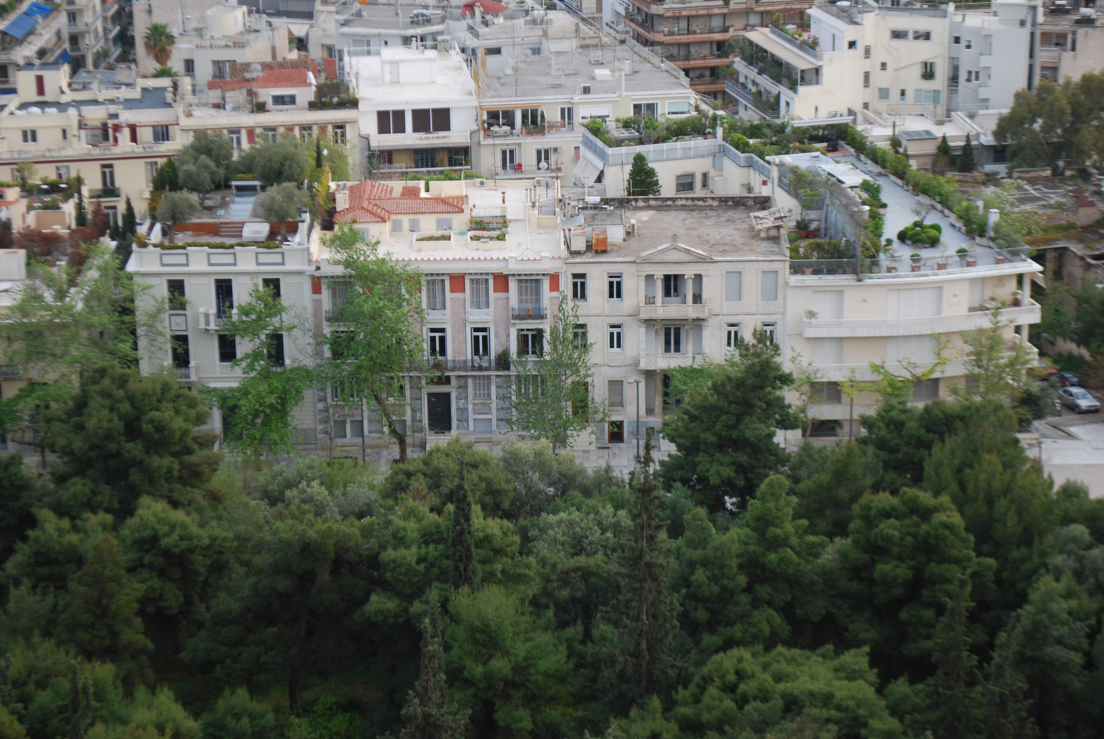 Vue de l'Acropole d'Athènes.